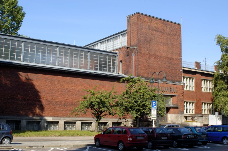 Dům umění v Ostravě, Foto: V. Šulc 2008, Galerie výtvarného umění v Ostravě